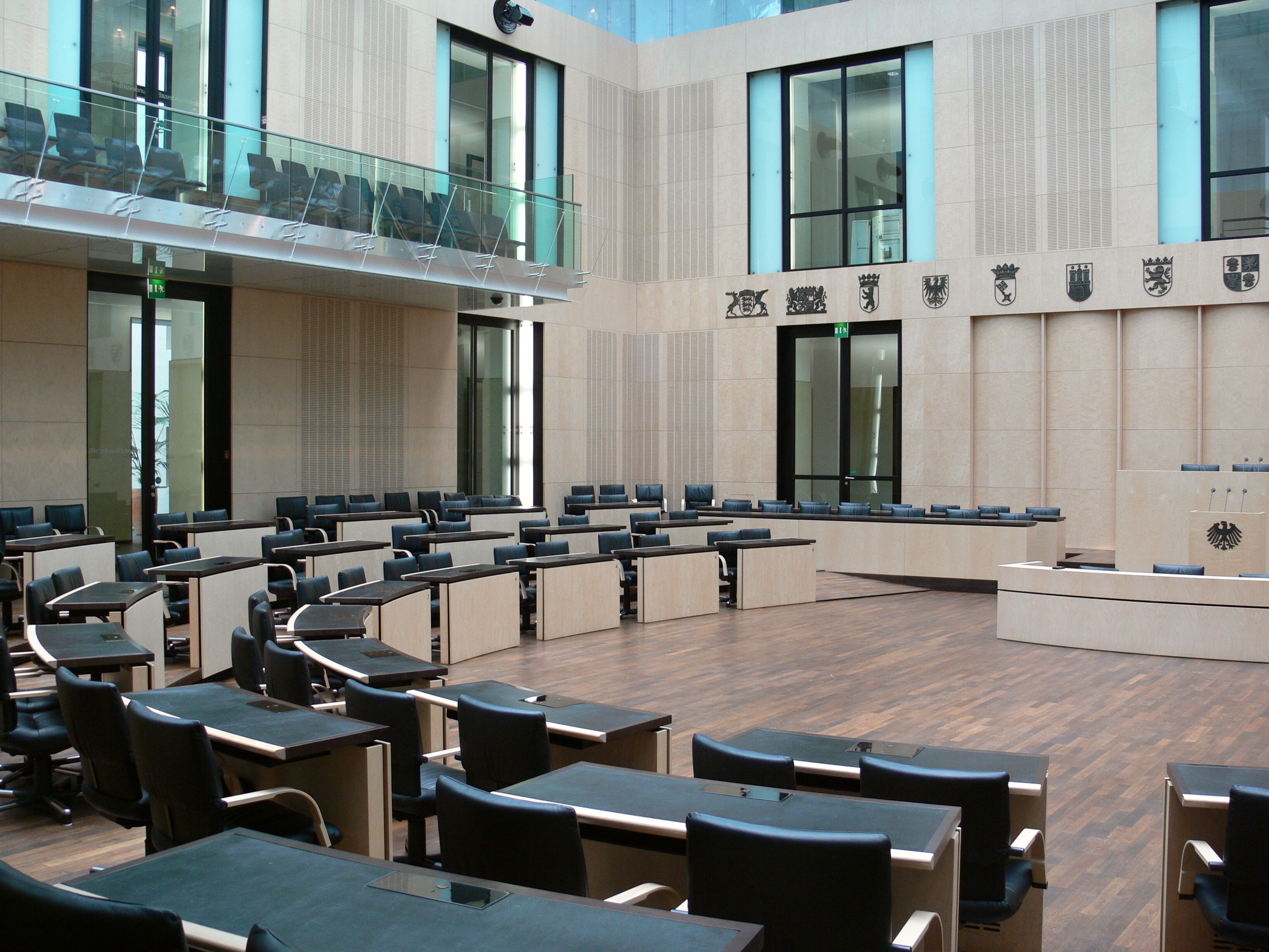 Plenarsaal des Deutschen Bundesrats Ehemaliges Preußisches Herrenhaus; Sitz des Bundesrats der Bundesrepublik Deutschland; Leipziger Straße, Berlin